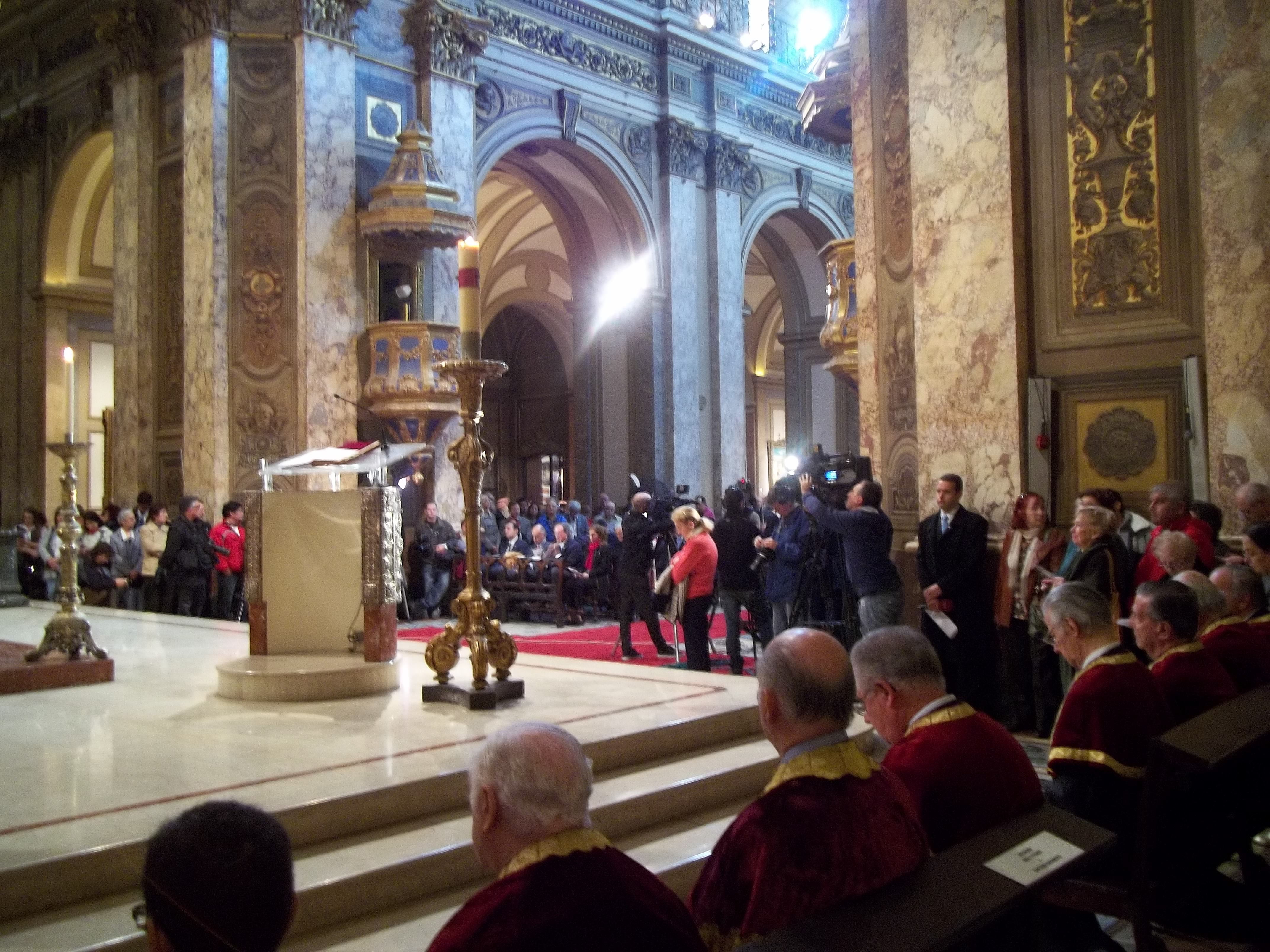 Vista de la Catedral Metropolitana durante el Tedeum del 25 de mayo 2012